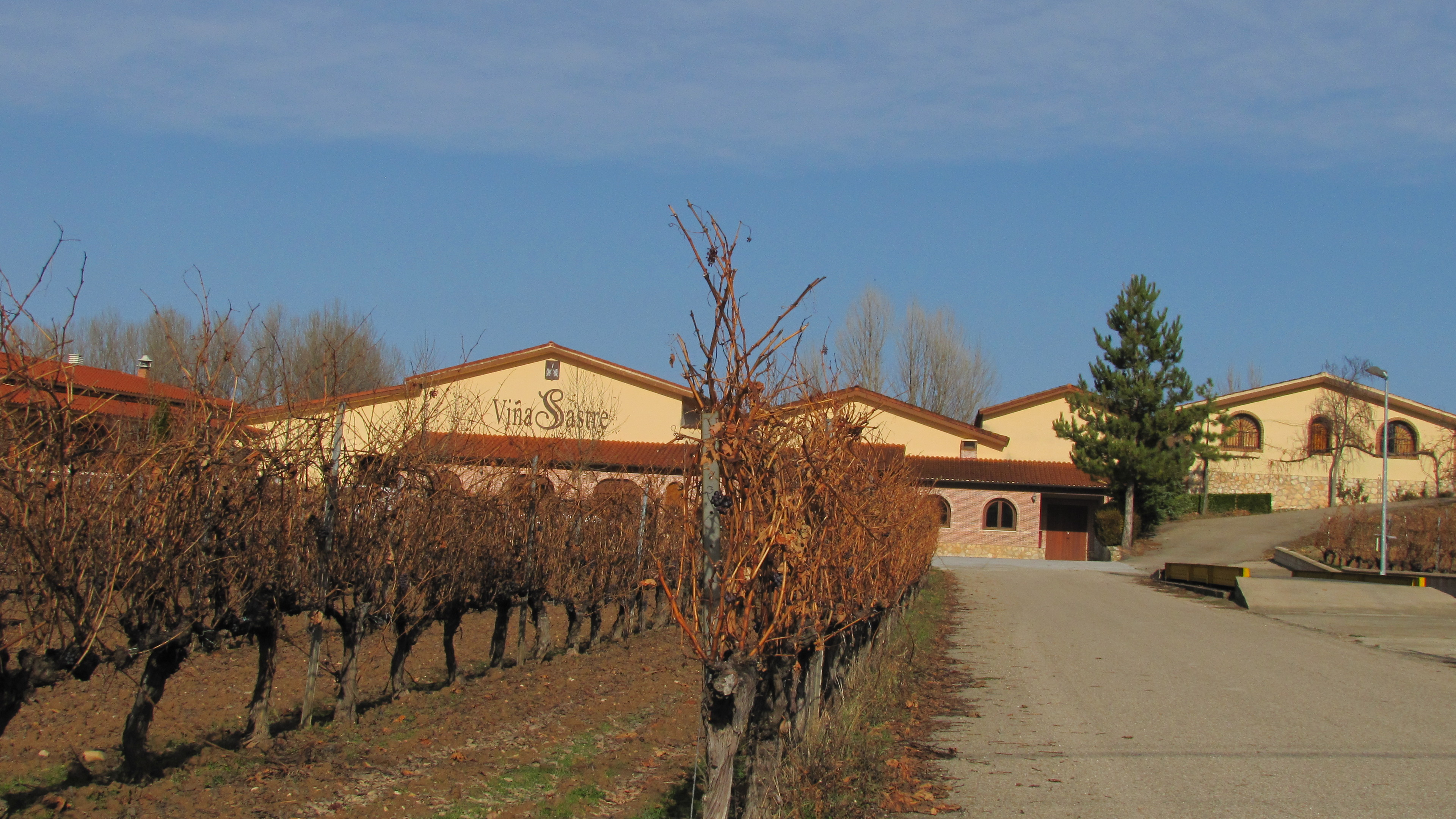 Viñedos de la variedad Tempranillo, dentro de la finca de la Bodega Viña Sastre - Hermanos Sastre en la Ribera del Duero burgalesa, en la población de la Horra (Burgos) España. Con la llegada del invierno las viñas se encuentran sin hojas.